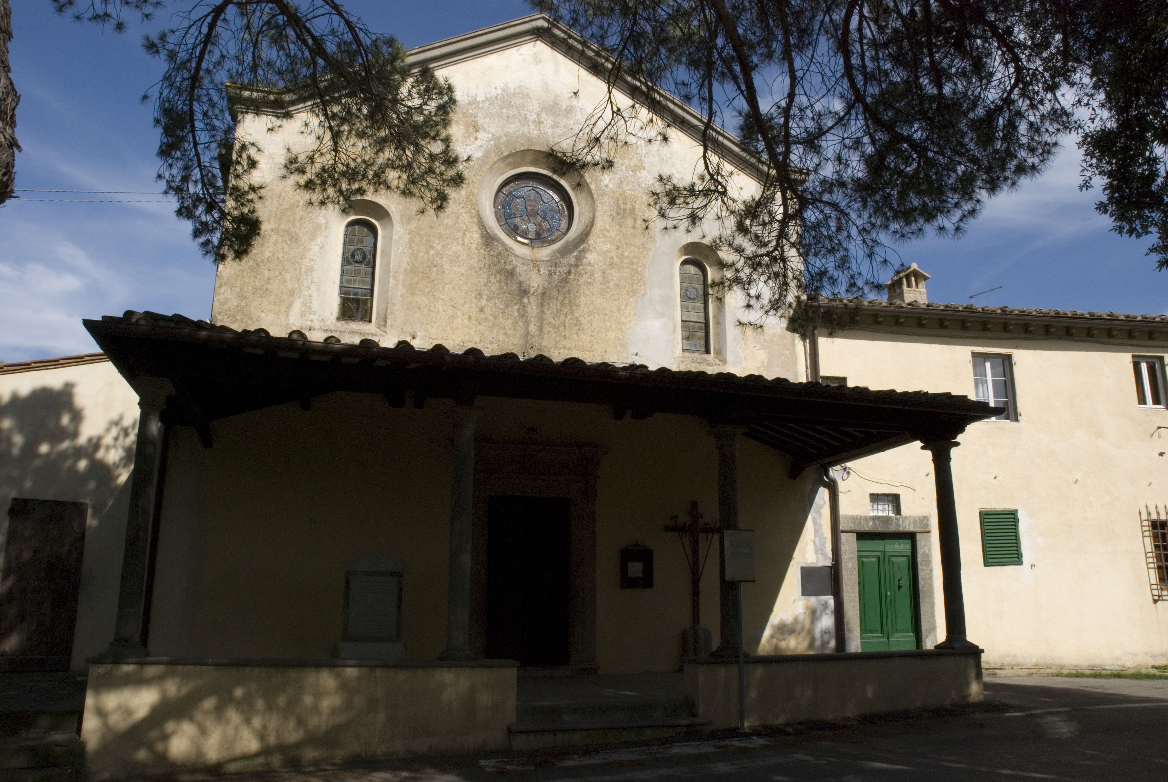 Chiesa di San Biagio a Poppiano